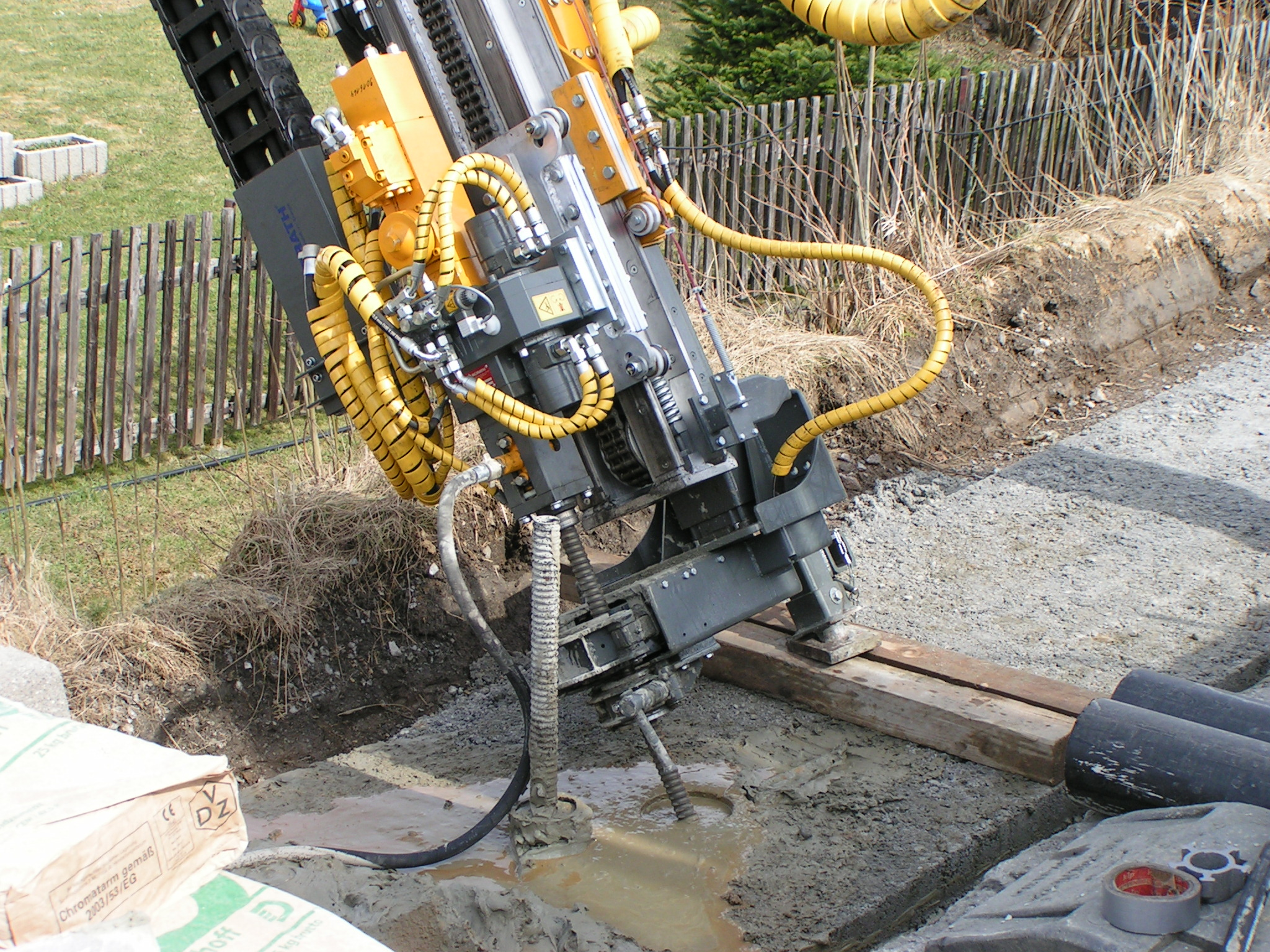 Bohren mit Zementsuspension